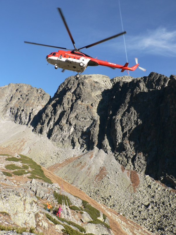 Mil Mi-8 vo Veľkej Studenej doline vo Vysokých Tatrách. Zvážal na Hrebienok pokrivené dielce vrtuľníka Mil Mi-4, ktorý havaroval v roku 1969.